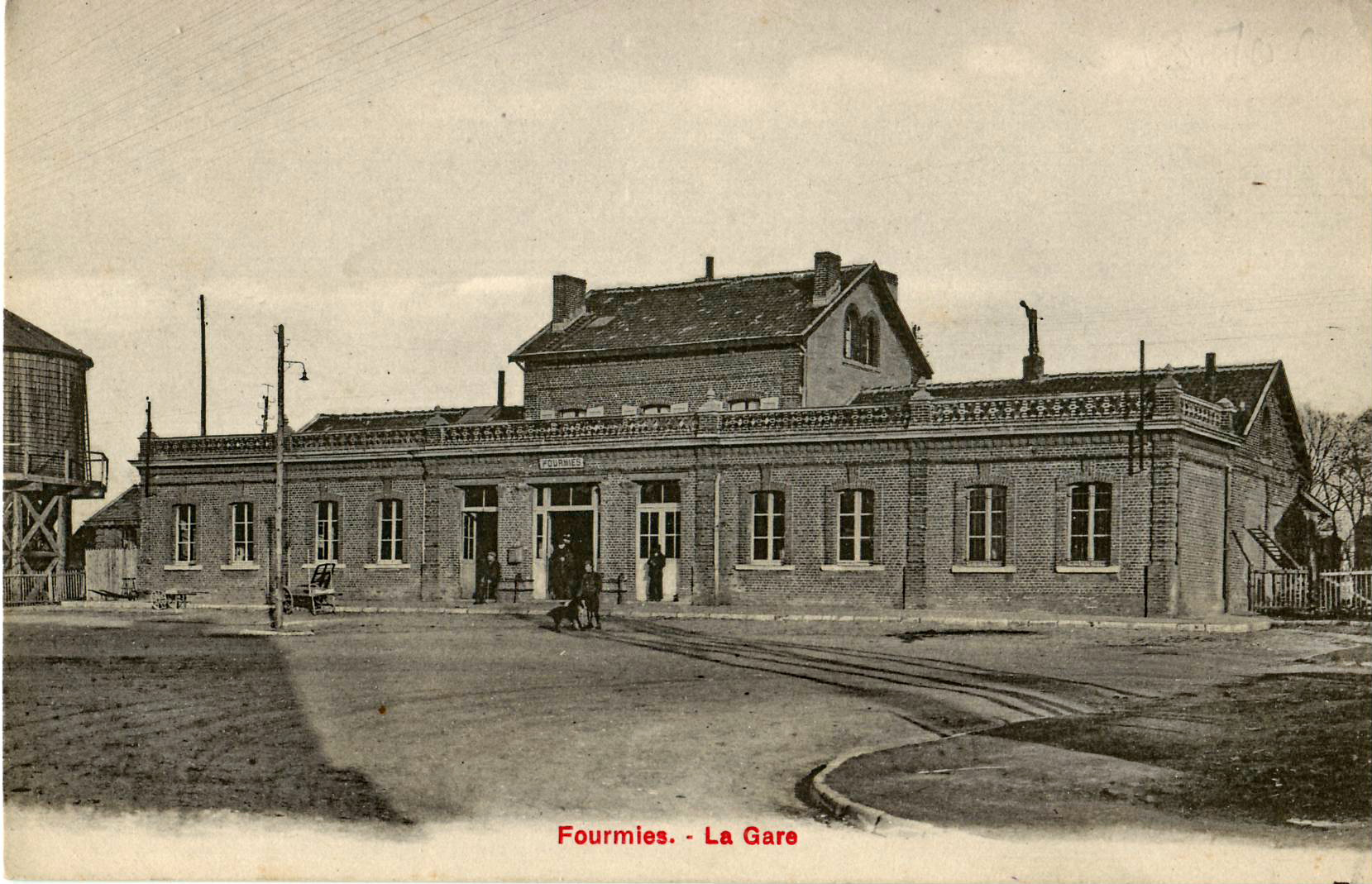 Carte postale ancienne éditée par Bréger : FOURMIES - La Gare